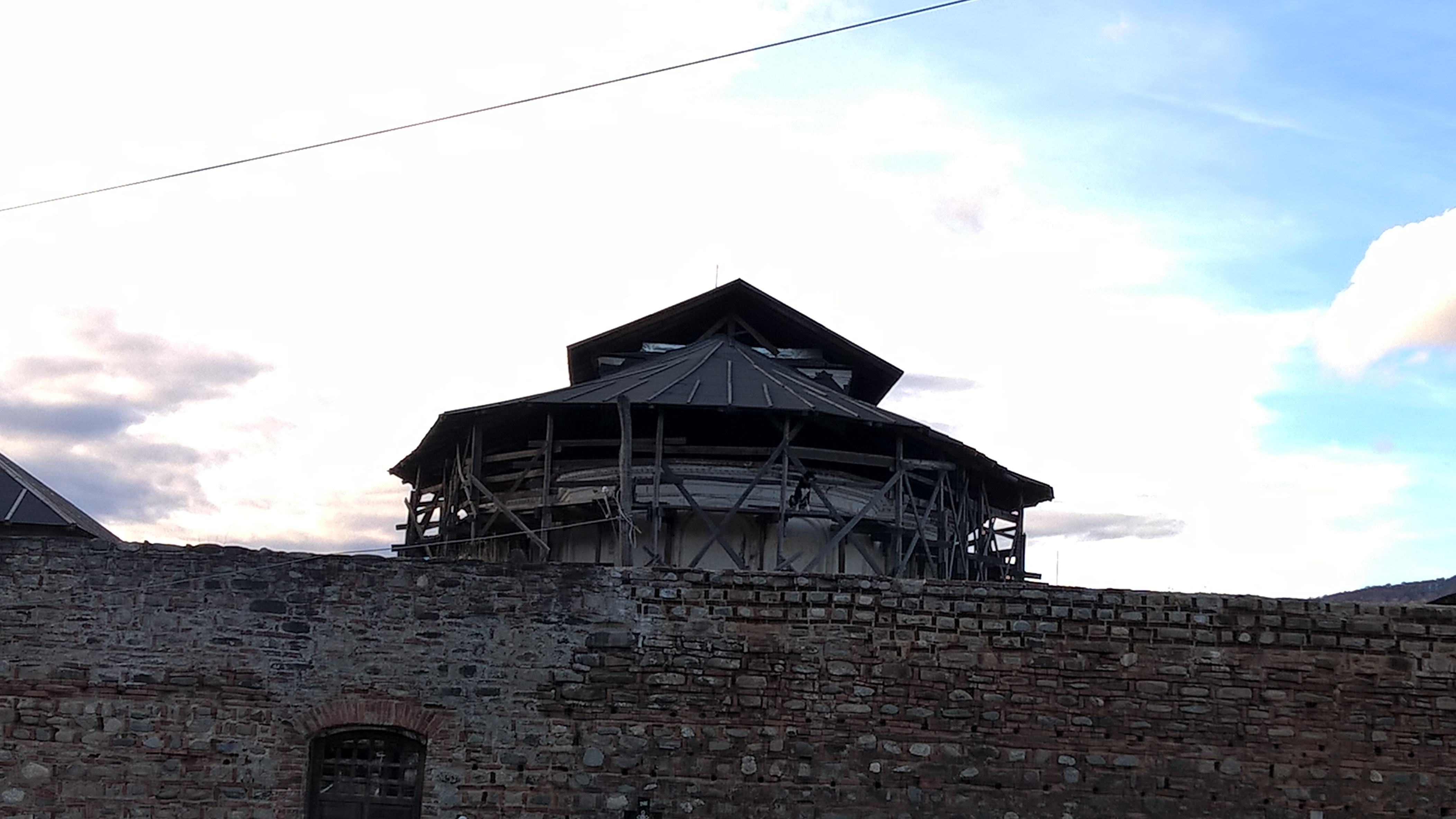 Zid de incintă 04